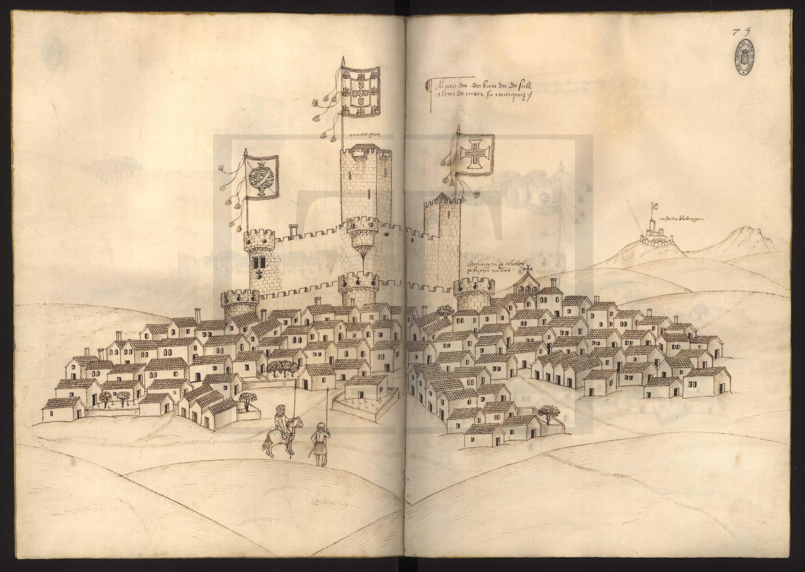 Livro das Fortalezas 73 - Almeida